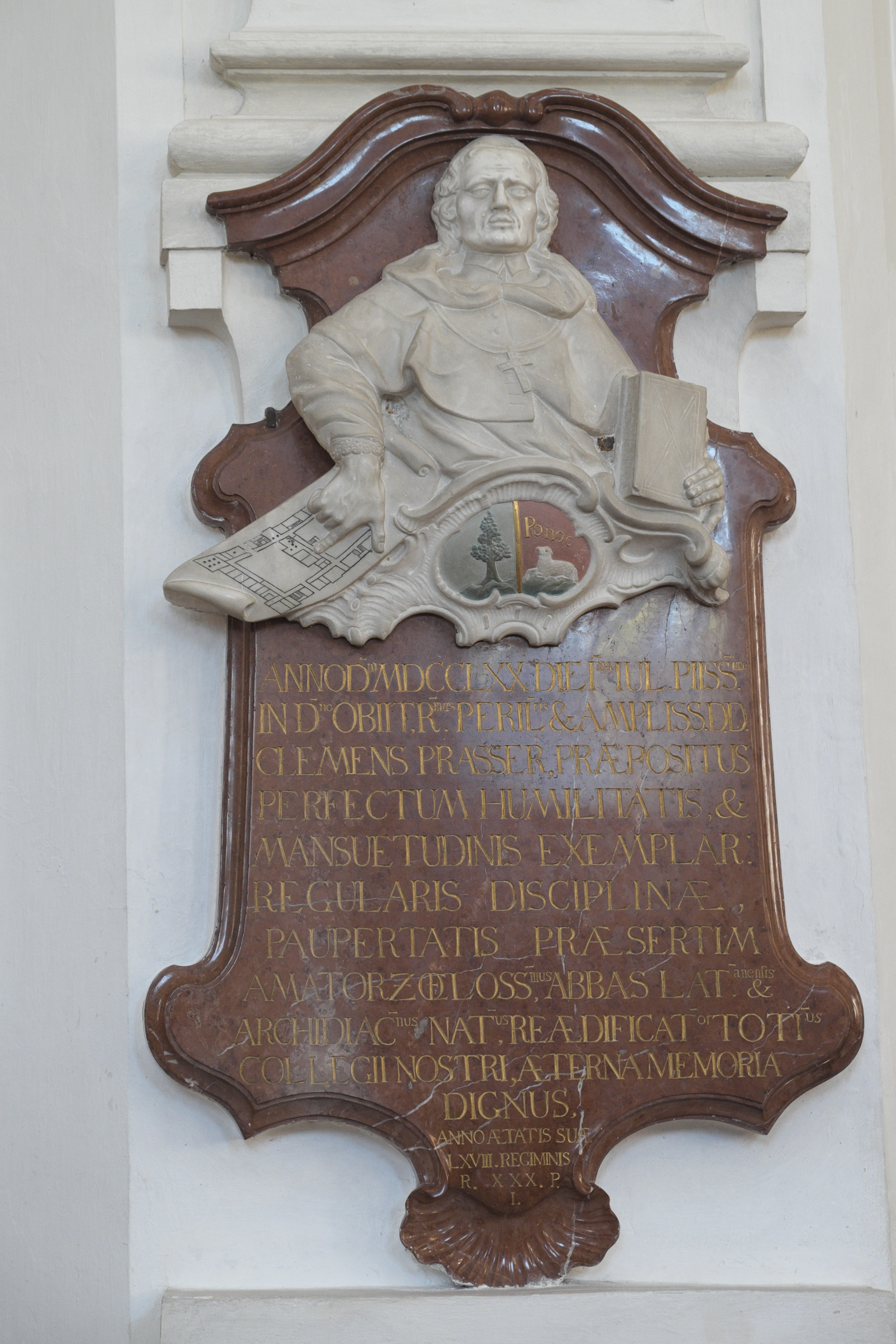 Katholische Pfarrkirche, ehemalige Augustiner-Chorherrenstiftskirche Mariä Geburt in Rottenbuch im Landkreis Weilheim-Schongau (Bayern/Deutschland), Epitaph für den Probst Clemens Prasser († 1770)